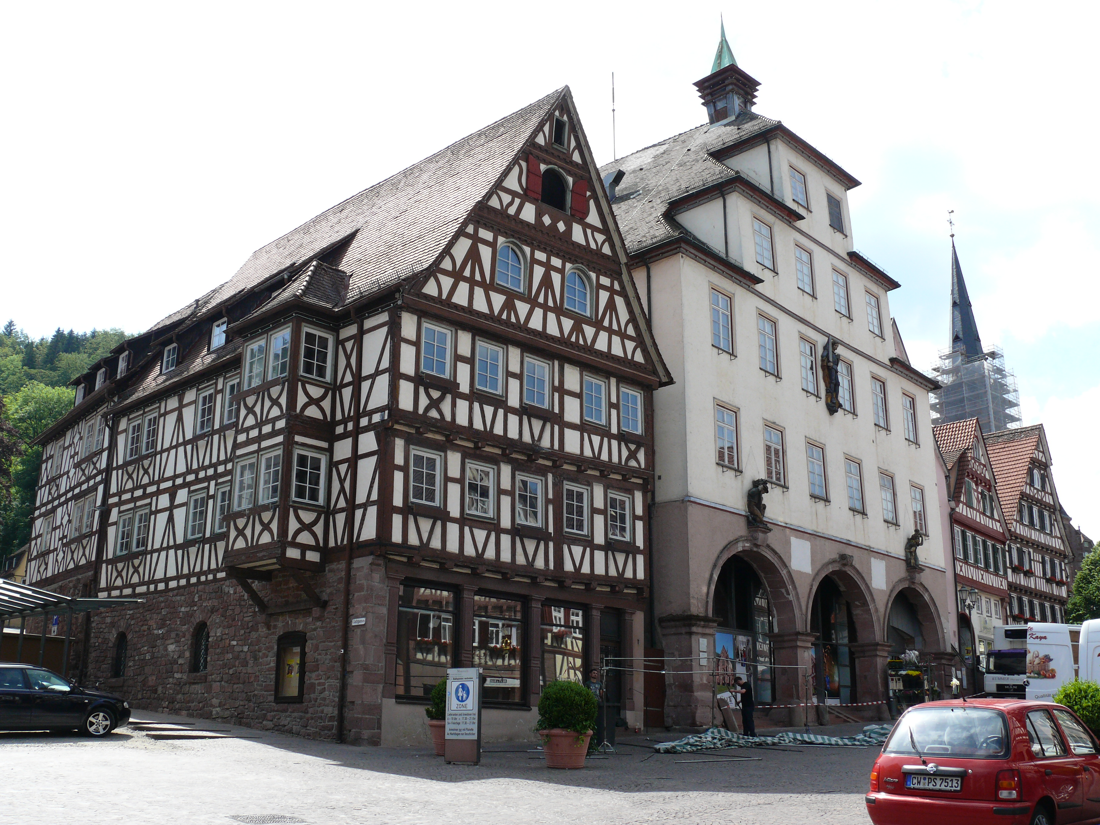 Das Calwer Rathaus am Marktplatz.